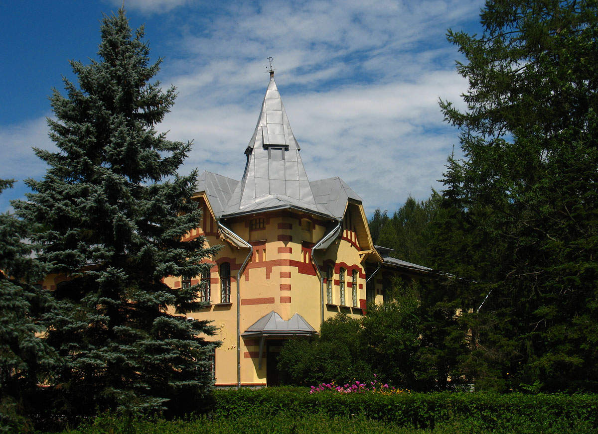 Беларуская (тарашкевіца): Лужасна